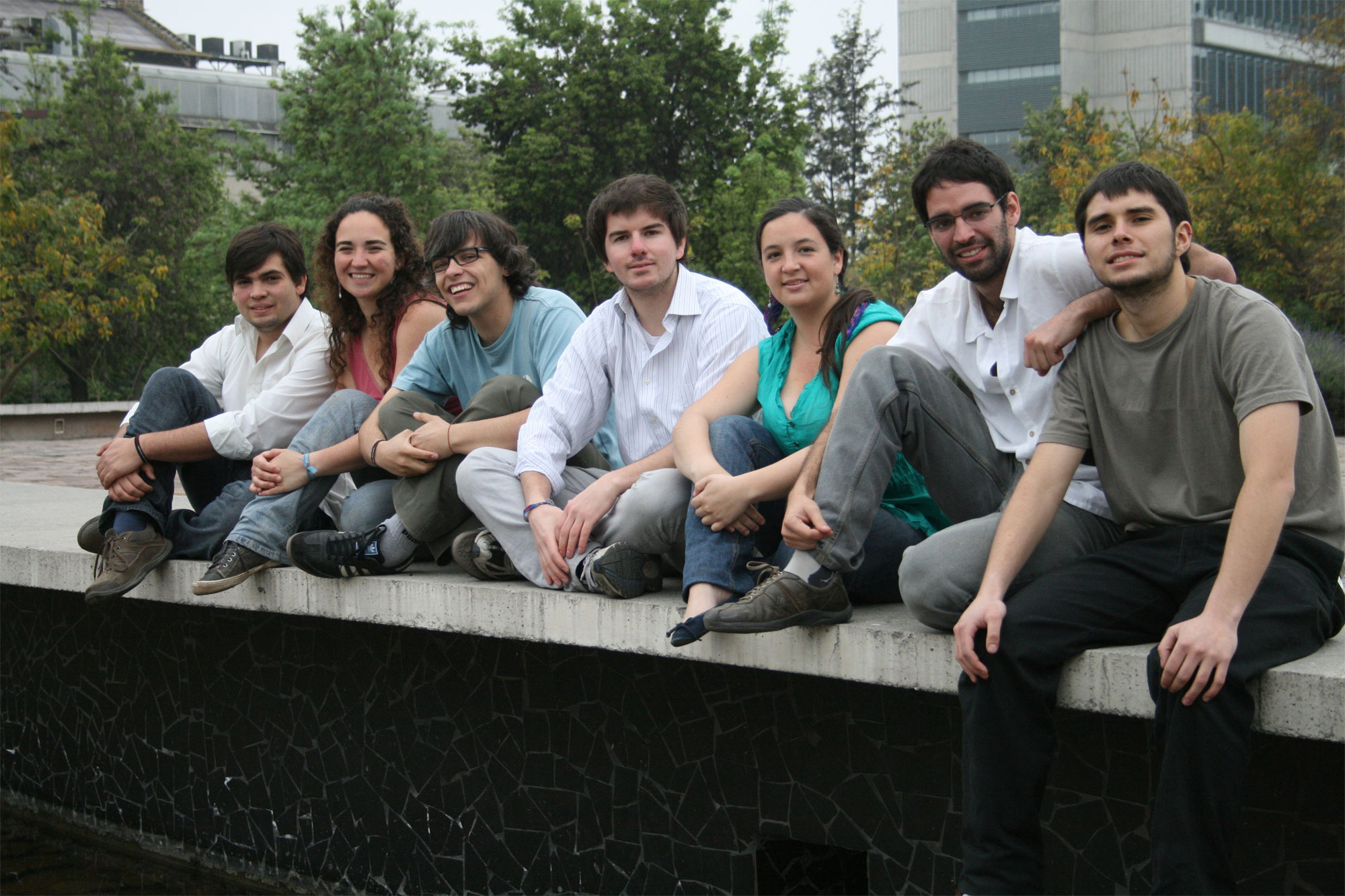 Giorgio Jackson (al centro) y el resto de la directiva FEUC.